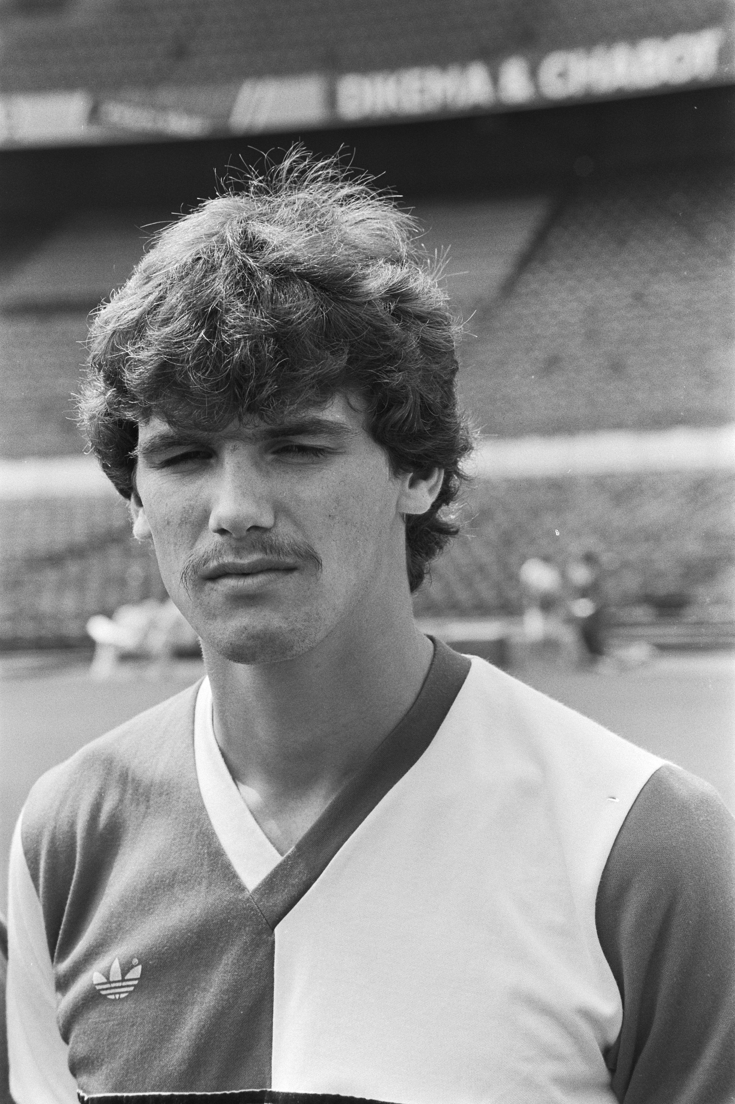 Collectie / Archief : Fotocollectie Anefo Reportage / Serie : [ onbekend ] Beschrijving : Persdag Feijenoord; 11, 12: Michel Valke , kop, 13, 14: Sjaak Troost , kop Datum : 29 juli 1982 Trefwoorden : sport, voetbal Instellingsnaam : Feyenoord Fotograaf : Dijk, Hans van / Anefo Auteursrechthebbende : Nationaal Archief Materiaalsoort : Negatief (zwart/wit) Nummer archiefinventaris : bekijk toegang 2.24.01.05 Bestanddeelnummer : 932-2611